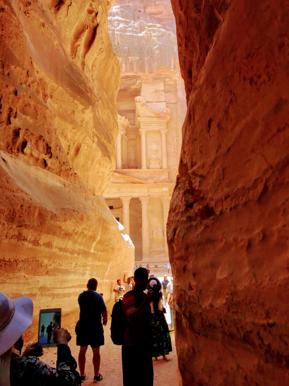 അൻപതോളം മീറ്റർ ഉയരത്തിലുള്ള പറയിടുക്കിലെ നടവഴിയിൽ നിന്നും ട്രഷറിയുടെ ദൂരക്കാഴ്ച ..അതൊരു മനോഹര കാഴ്ചതന്നെ..!